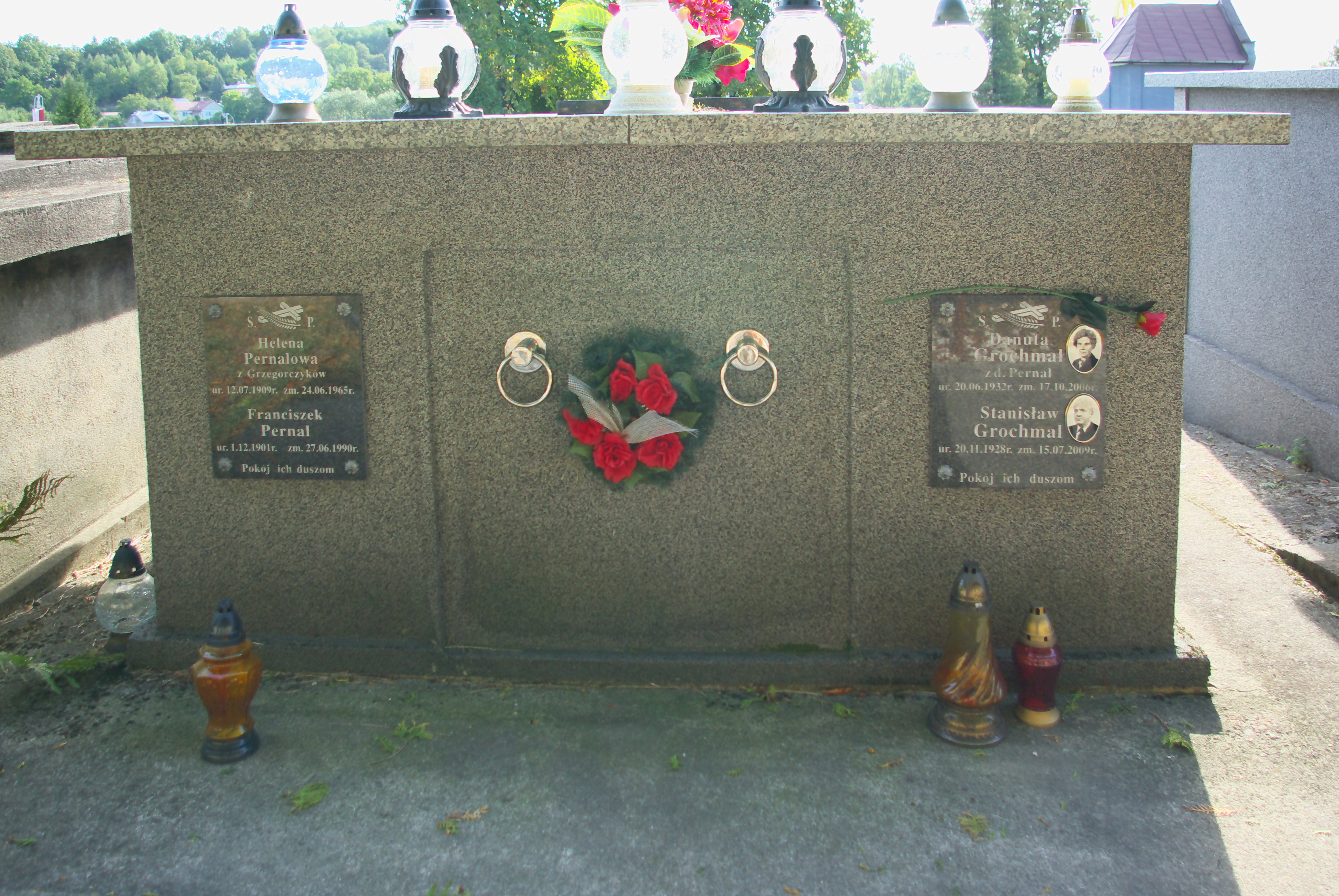 Grobowiec rodzin Pernalów i Grochmalów na Cmentarzu Centralnym w Sanoku. Pochowany Stanisław Grochmal